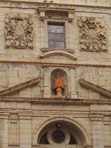 Detalle de la fachada de la Iglesia de la Anunciación en Santander, en la cuál se pueden apreciar los escudos del marqués de Villapuente y de su prima y esposa, la marquesa de las Torres de Rada